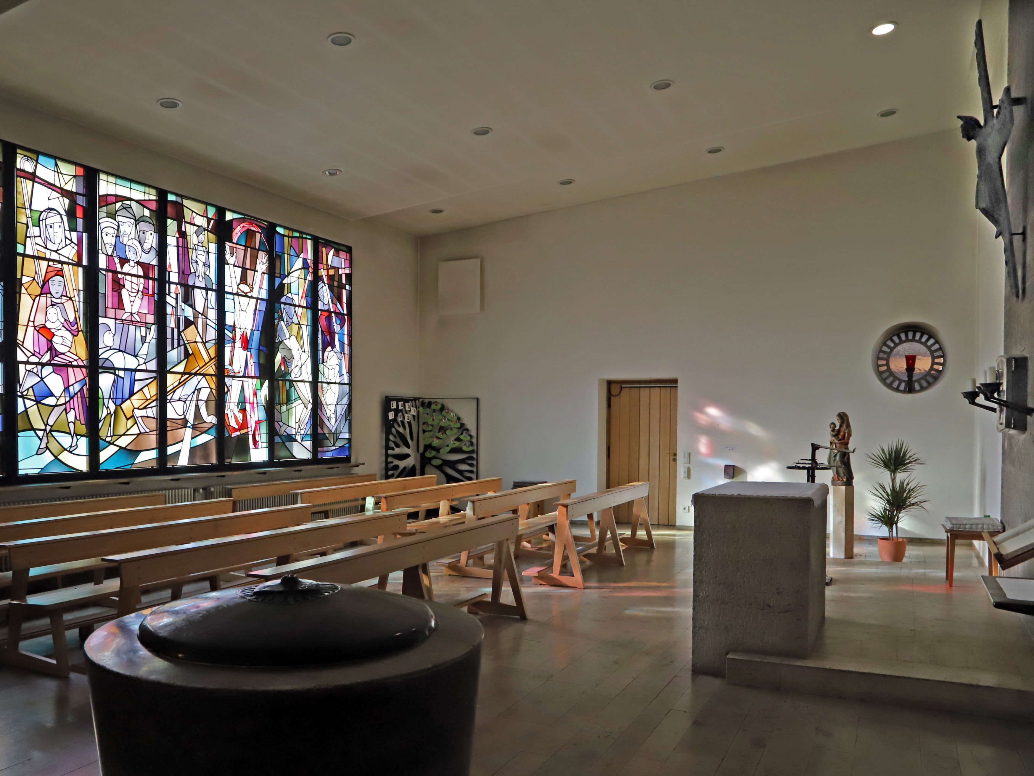 St. Lantpert München; Stained glass windows by Ernst Weiers